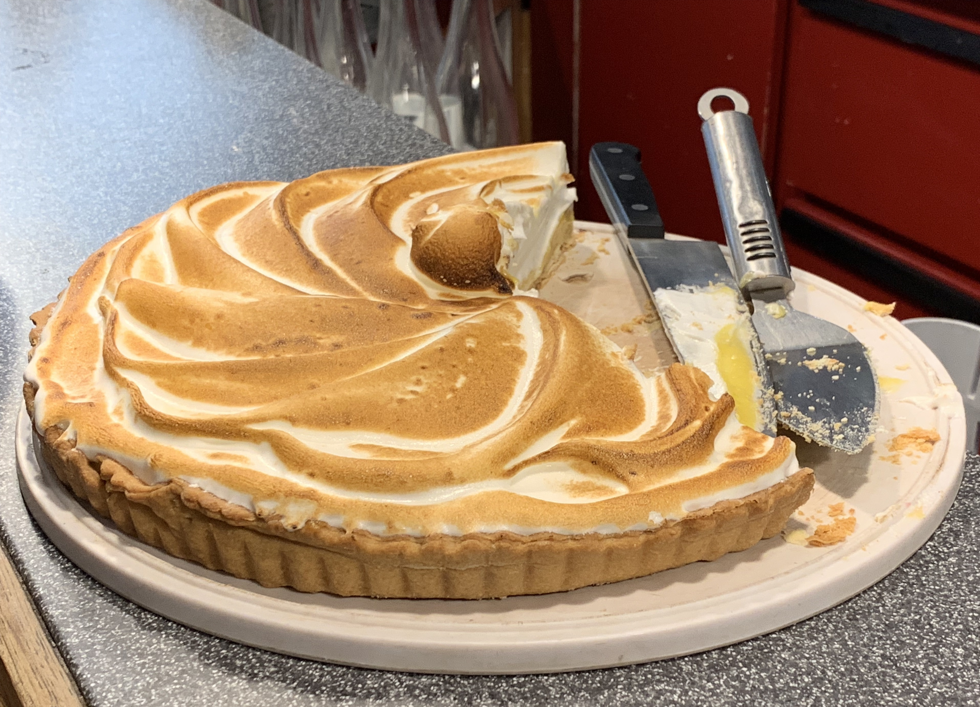 Tarte au citron meringuée sur le comptoir du restaurant La Cocagne (Lyon).